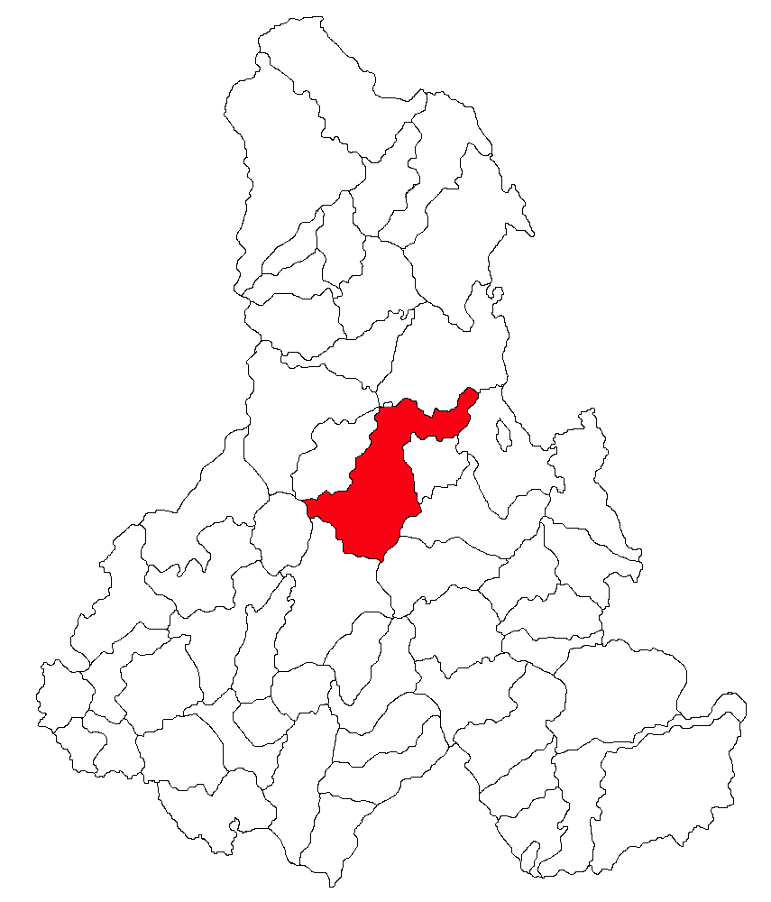 Categorie:Hărţi ale judeţului Harghita Contents 1 Licensing 2 Sursă 3 Licensing 4 Original upload log Licensing Sursă ro::Imagine:Harta_jud_Harghita.png